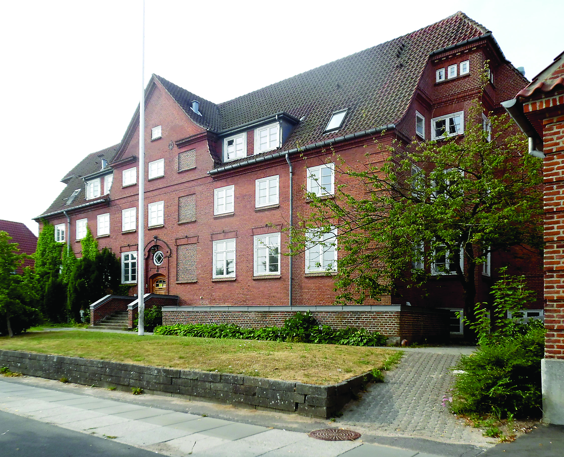 Museum Ovartaci flytter til det tidligere kvindehjem på Katrinebjegvej 81 i Aarhus